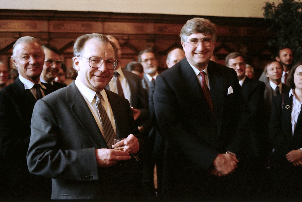 Landesregierung in Freiburg; Empfang im Ratssaal; Ministerpräsident Späth, Oberbürgermeister Böhme